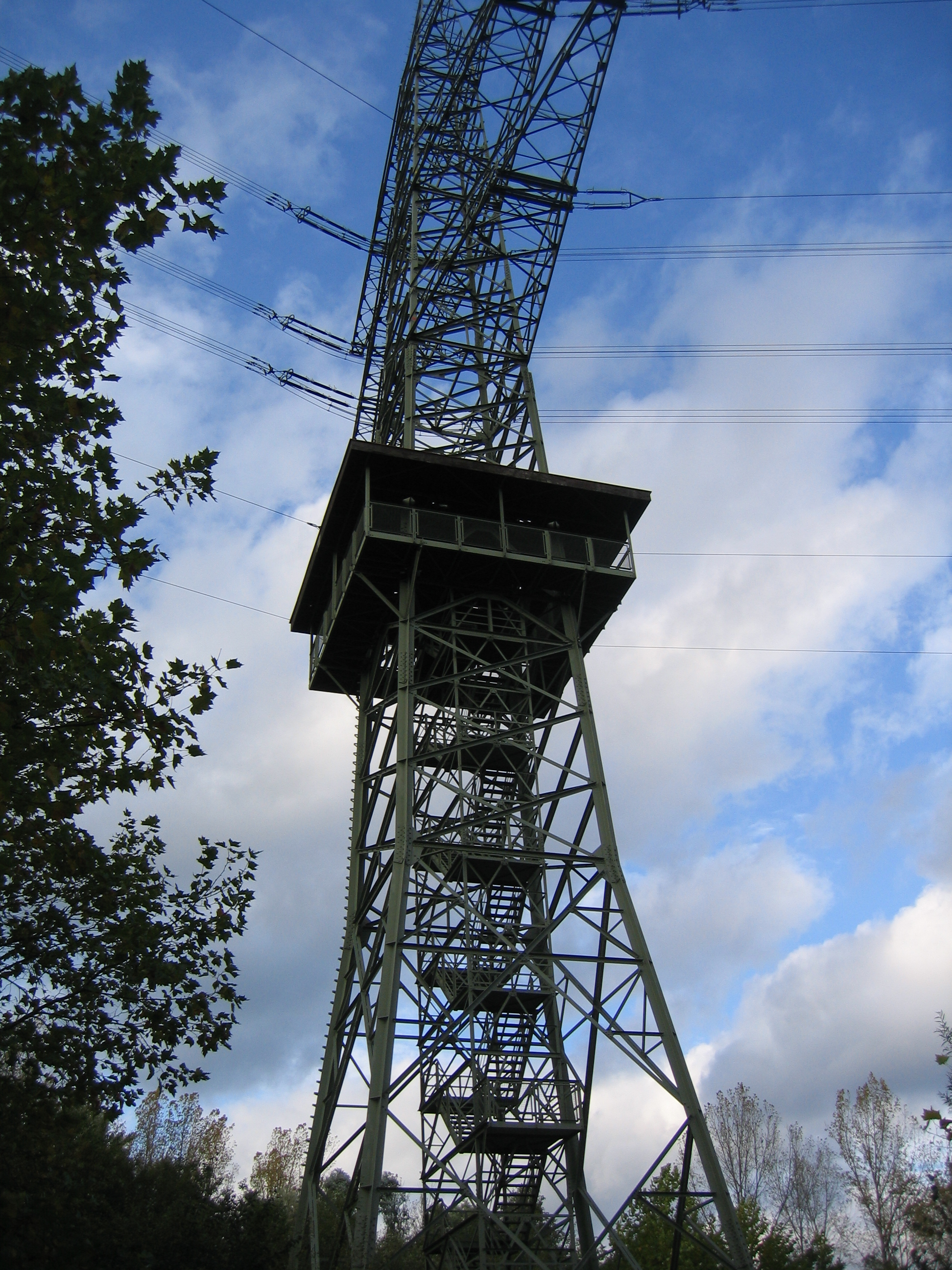 Der Aussichtsturm im Hochspannungsmast oberhalb des Bleibtreusees